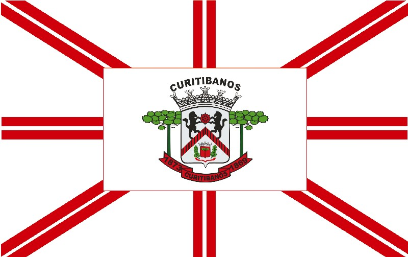 Drapeau de la municipalité de Curitibanos - SC - Brésil